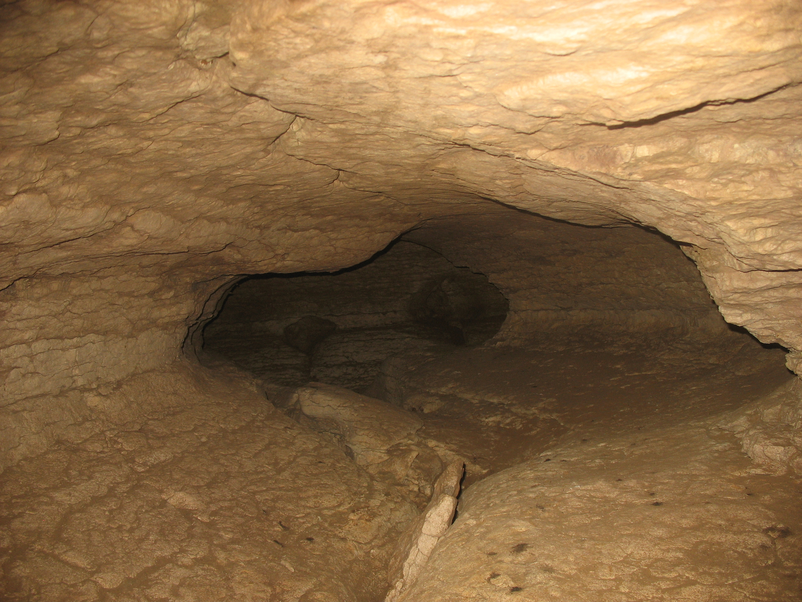 Manavpınarı Mağarası